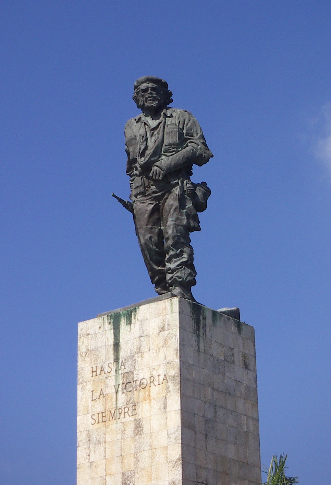 Cette statue est érigée sur la Place de la Révolution à Santa Clara, près du mausolée où se trouvent les restes du révolutionnaire (photo personnelle).